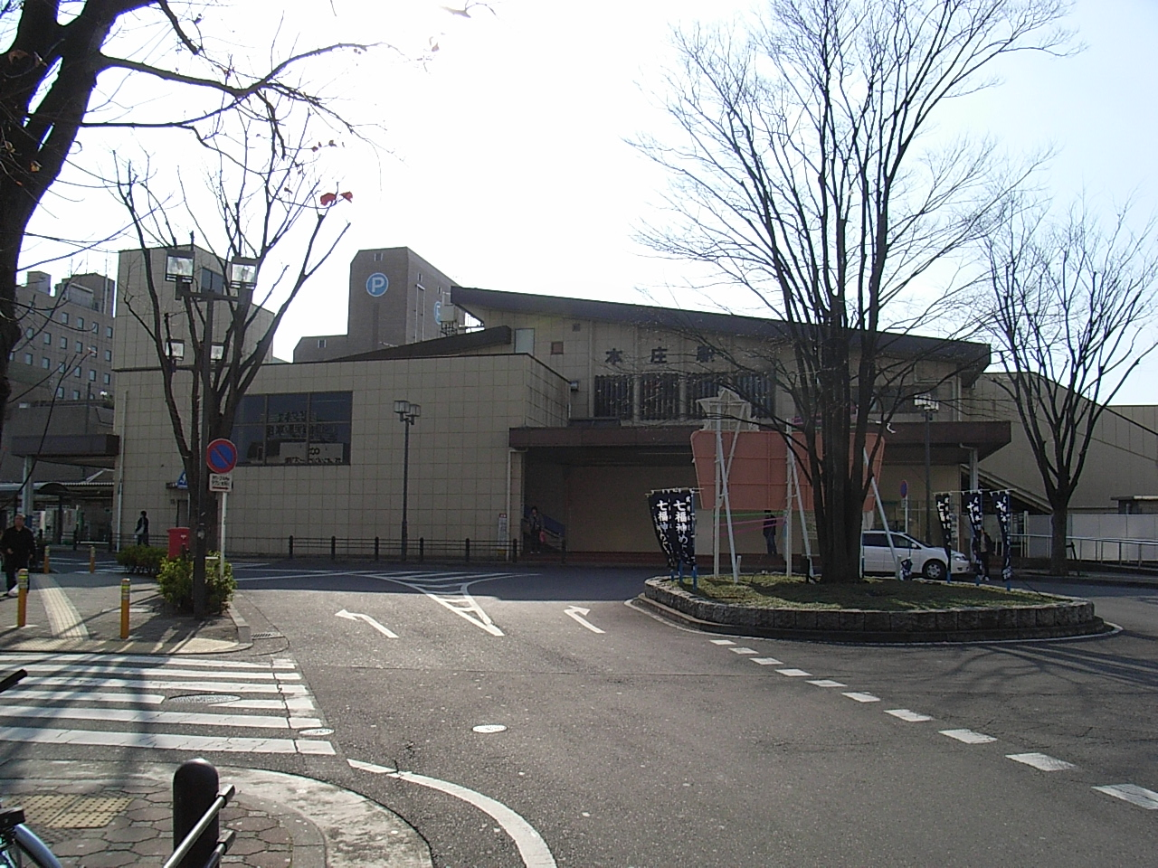 Honjo Station (North Entrance) on JR Takasaki Line. (3-6-19,Ginza,Honjo-shi,Saitama-ken,JAPAN)